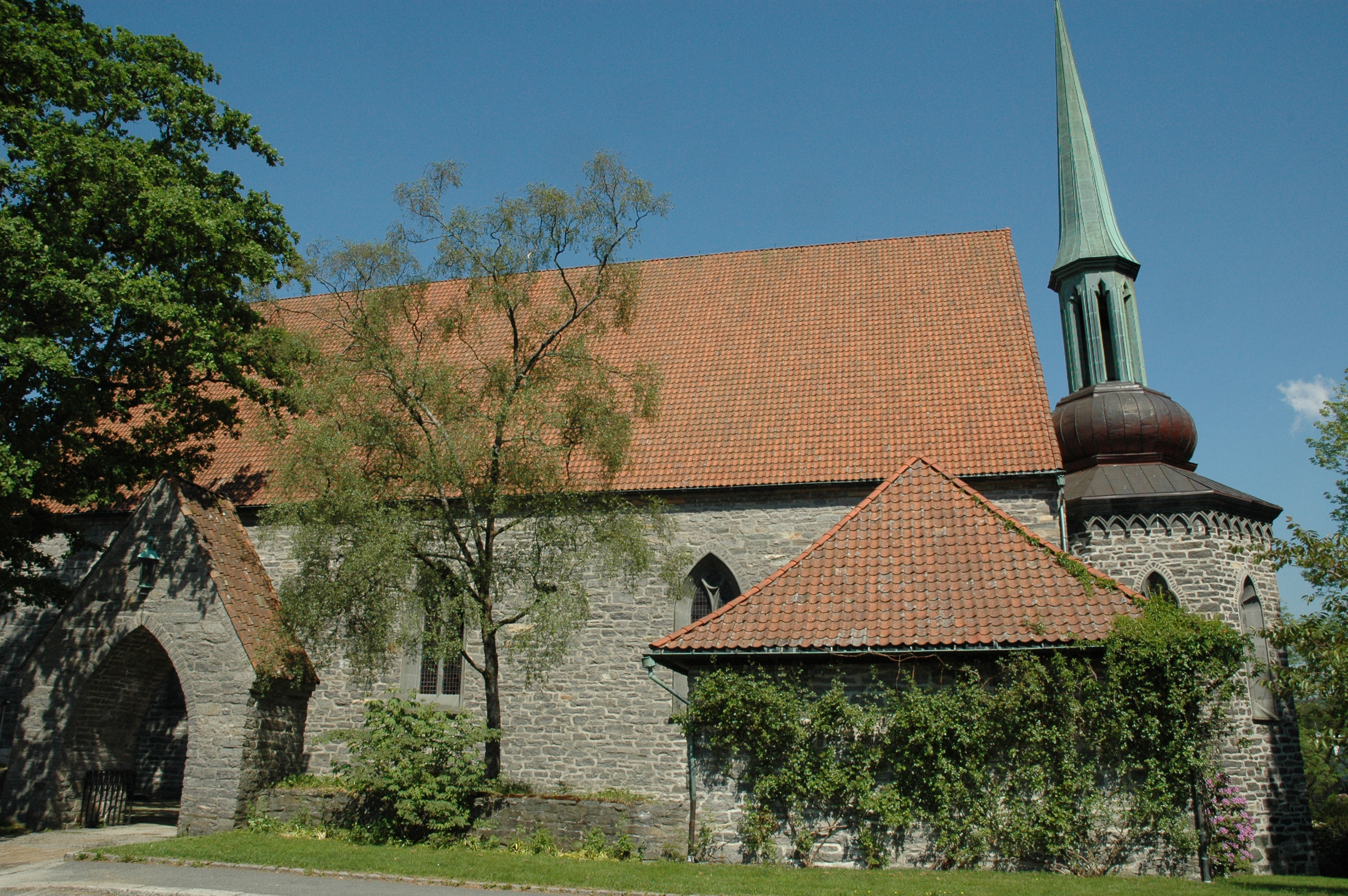 Storetveit kirke, Bergen